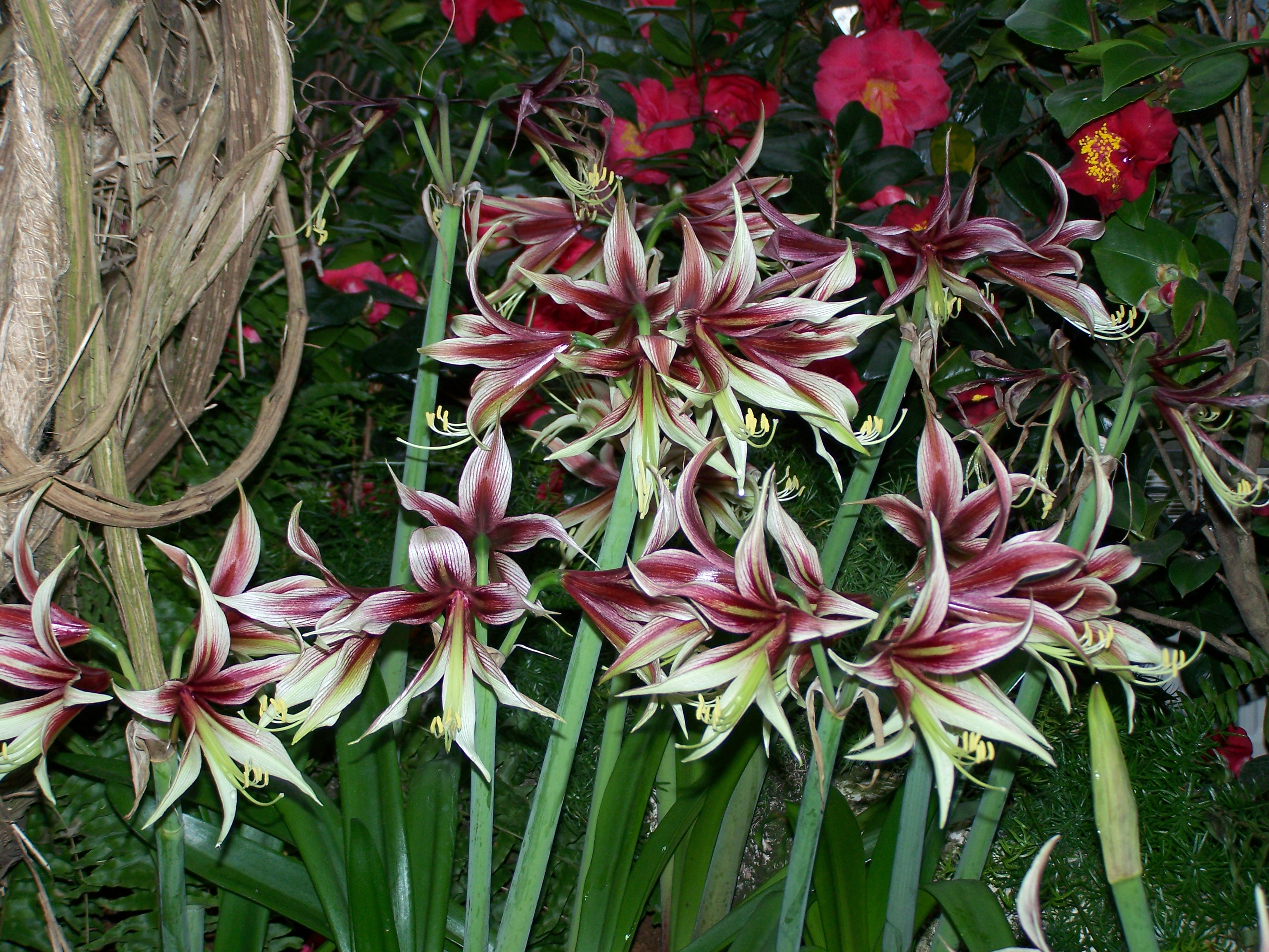 Hippeastrum papilio hybrid